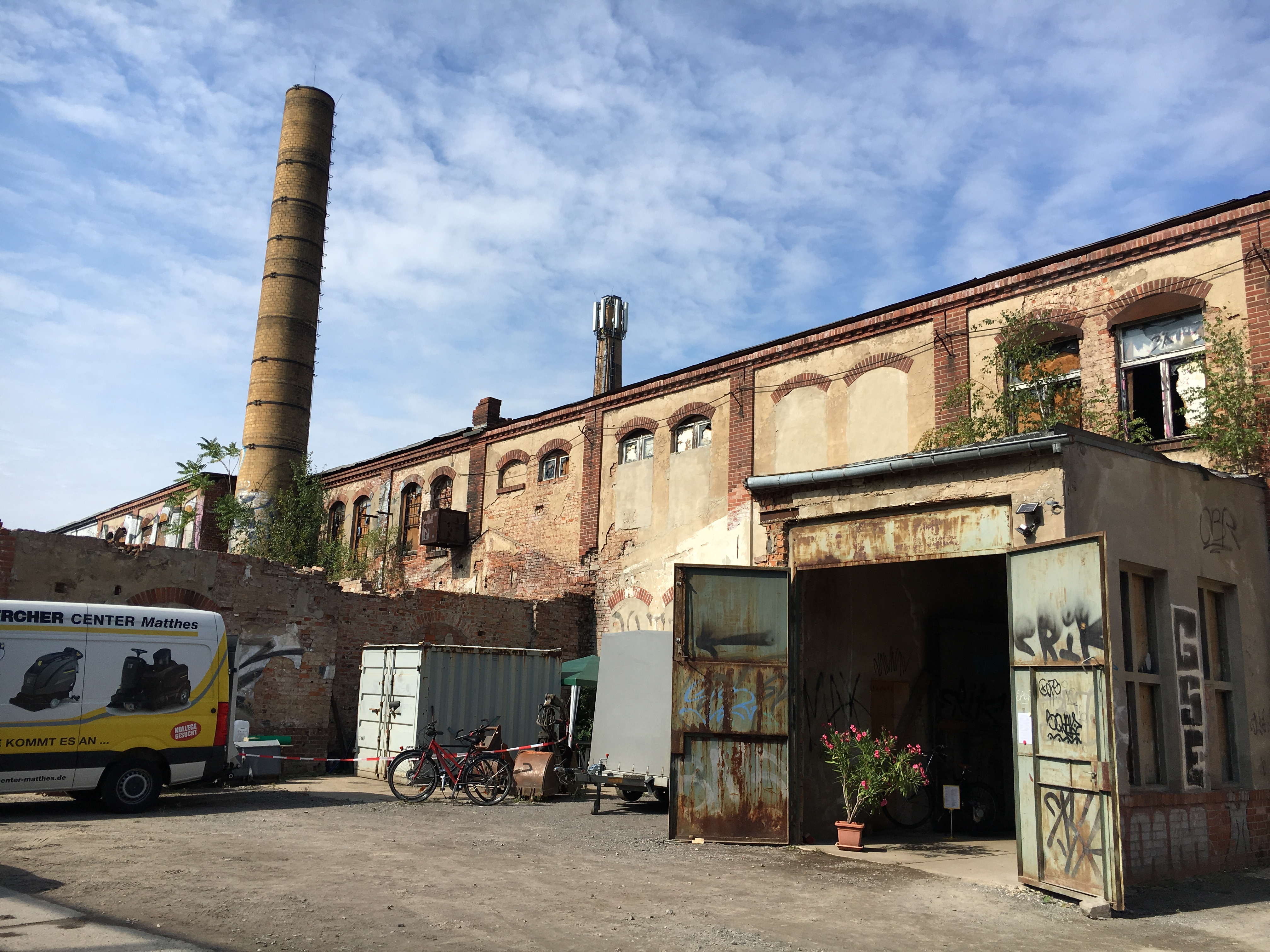 Radebeul, Zerma, Tag des offenen Denkmals 2019. Aufnahmen mit Genehmigung des Eigentümers und Gastgebers des TdoD.